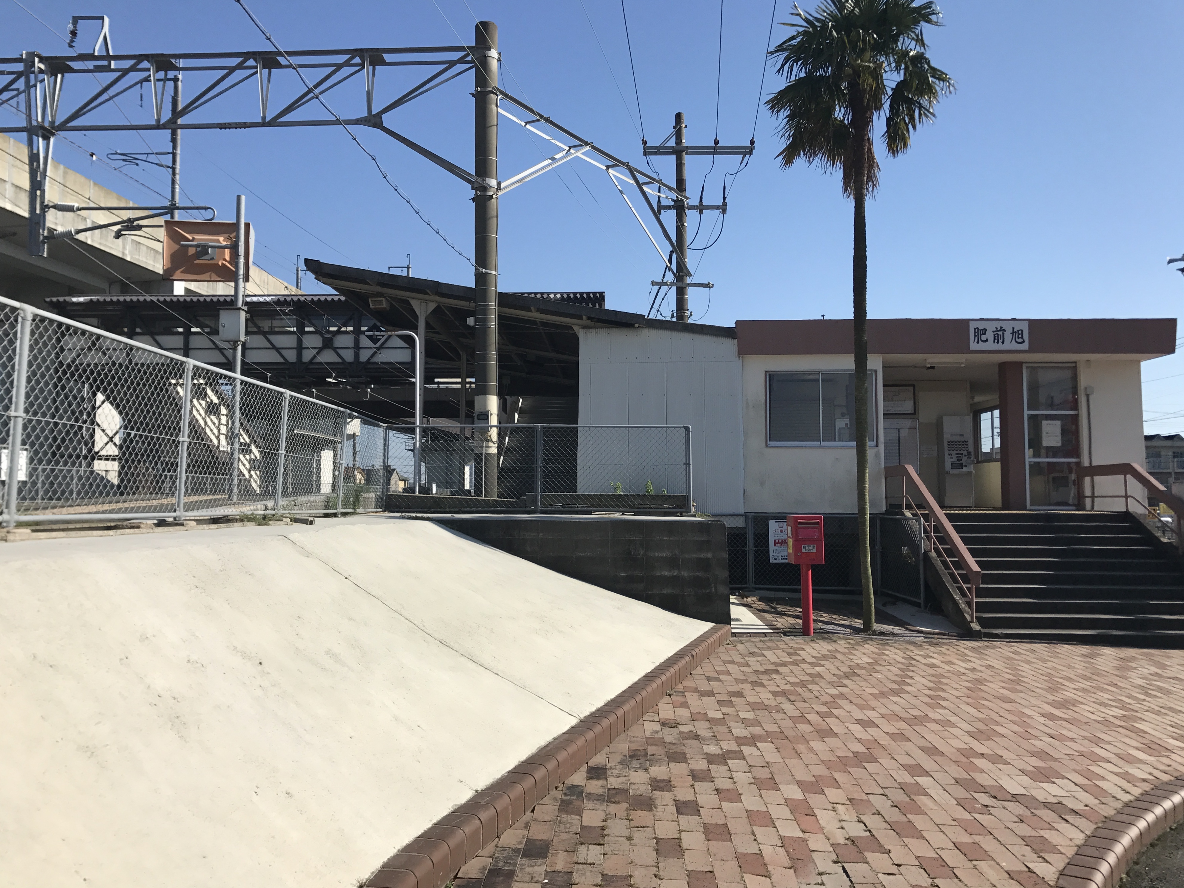 肥前旭駅駅舎